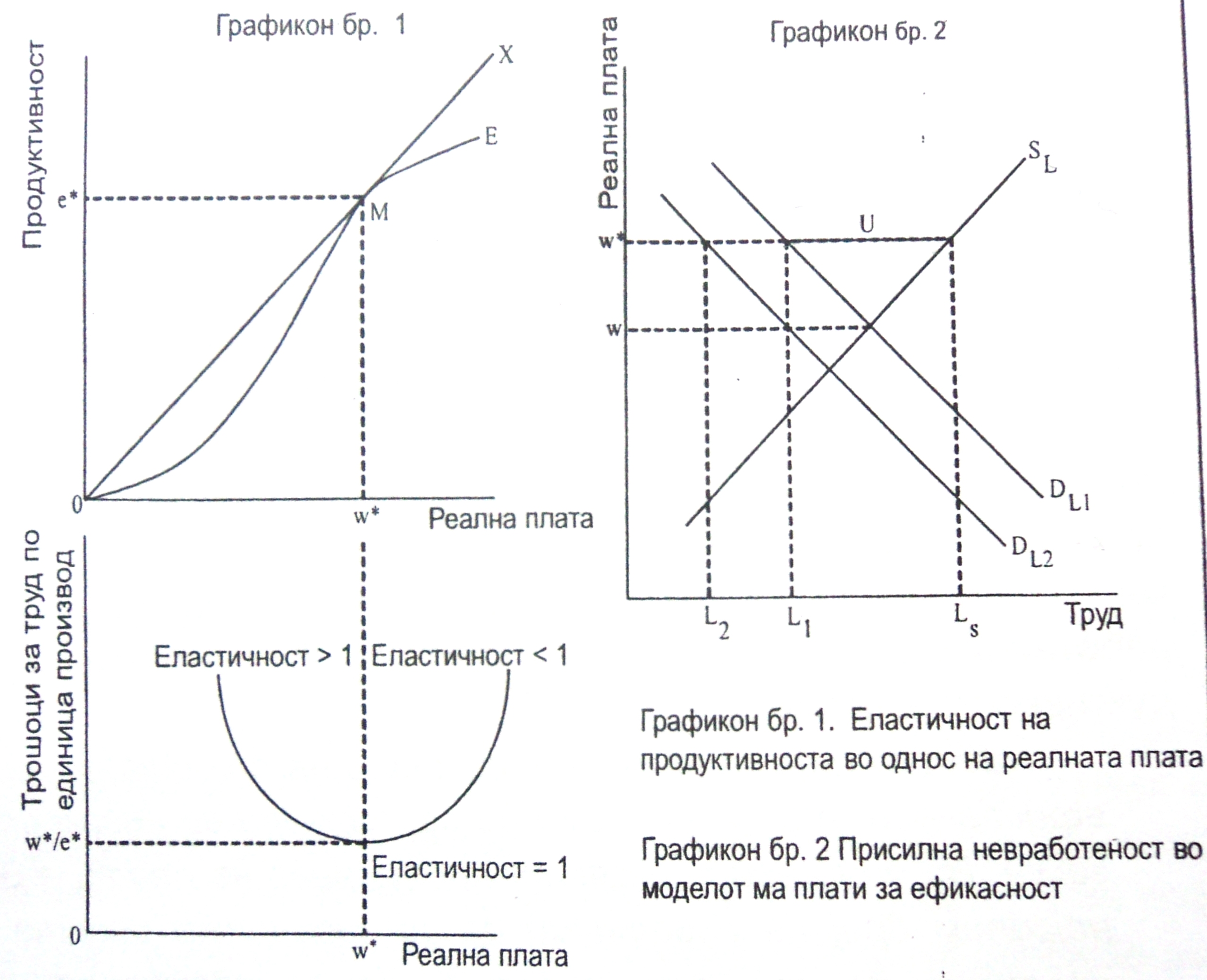 Snowdon, Vane and Wynarczyk model